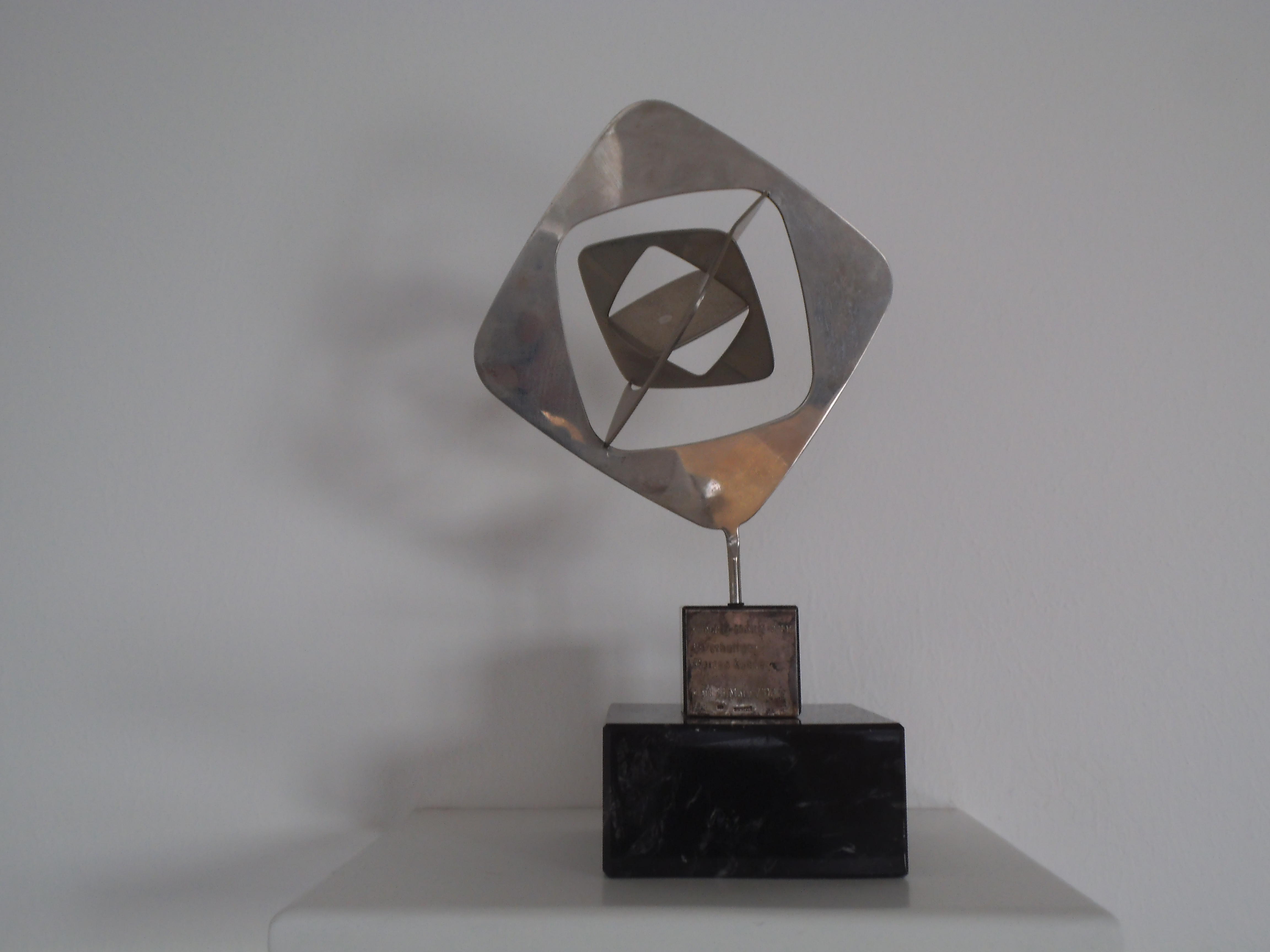 Der Grimme-Preis, der der heute-show 2010 verliehen wurde. Aufgenommen am 26. Januar 2018 in Köln-Mülheim.